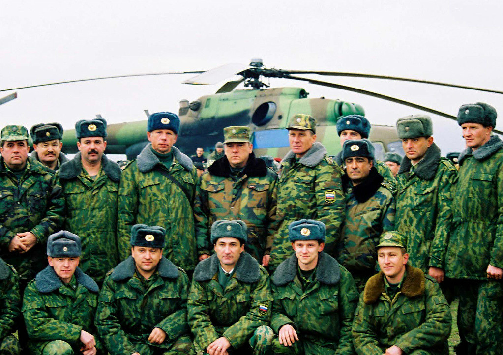 Перед взлетом, герой России генерал-майор Шаманов В.А. с офицерами группировки, Ханкала